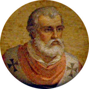 Medaillon von AGAPITUS II in St. Paul vor den Mauern